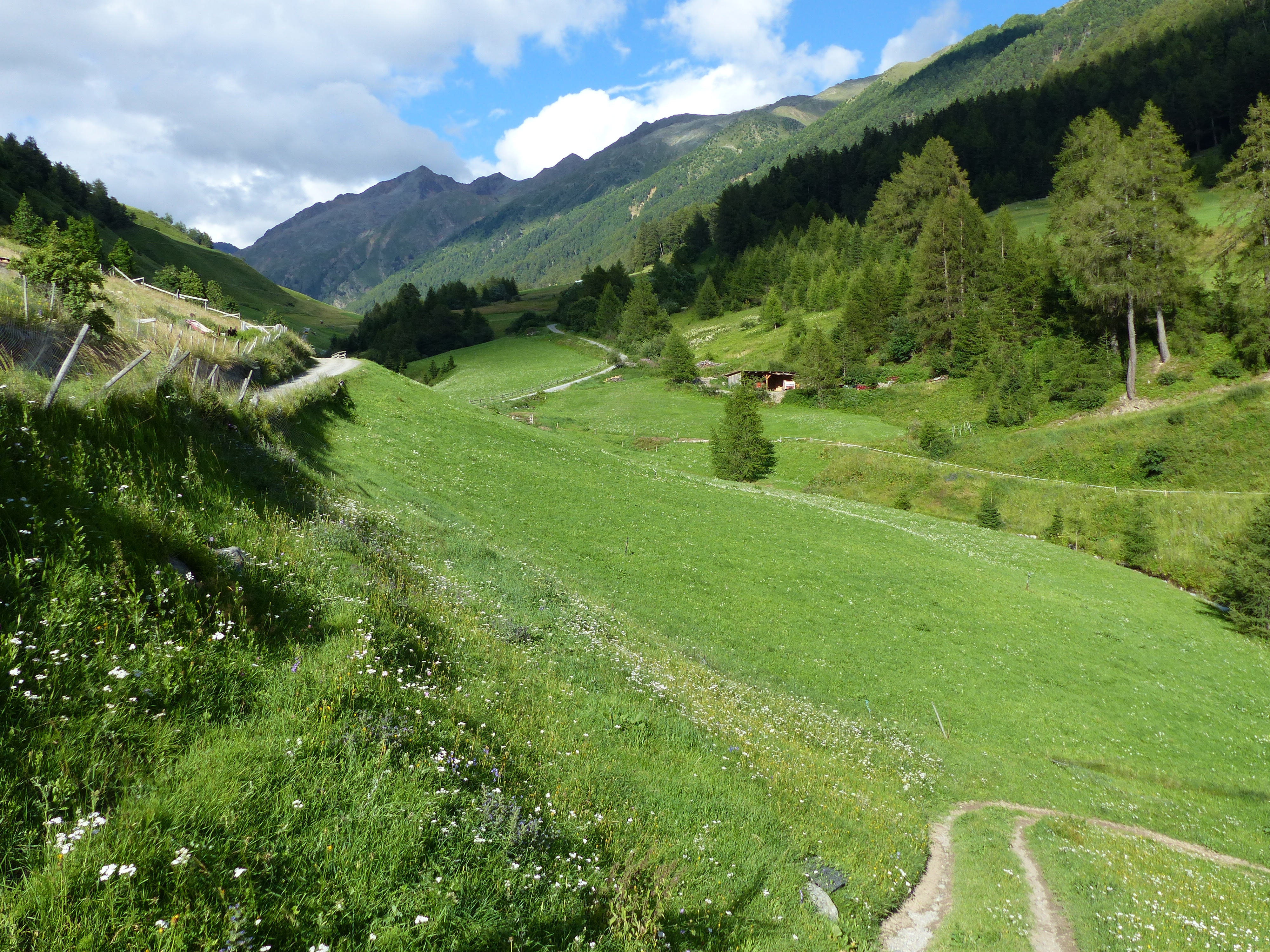 Blick ins Planeiltal von etwas oberhalb von Planeil